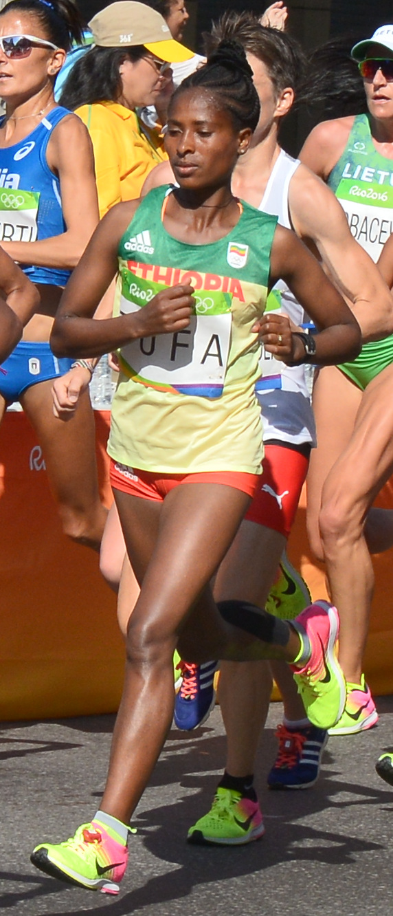 Passage du marathon des jeux olympiques de Rio 2016 dans le centre de Rio